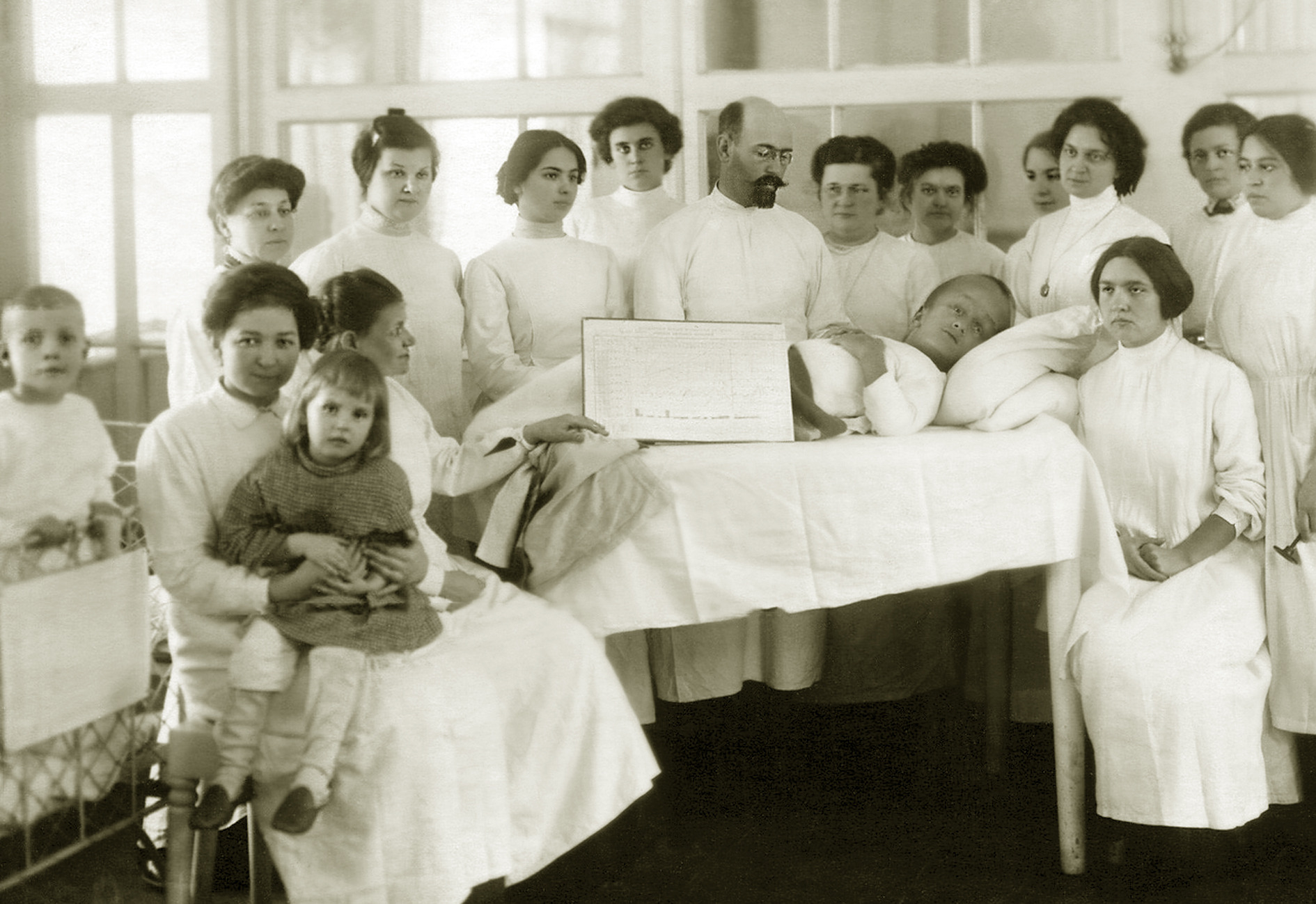 Занятия проводит ассистент детской клиники Женского медицинского института Санкт-Петербурга Виктор Осипович Мочан